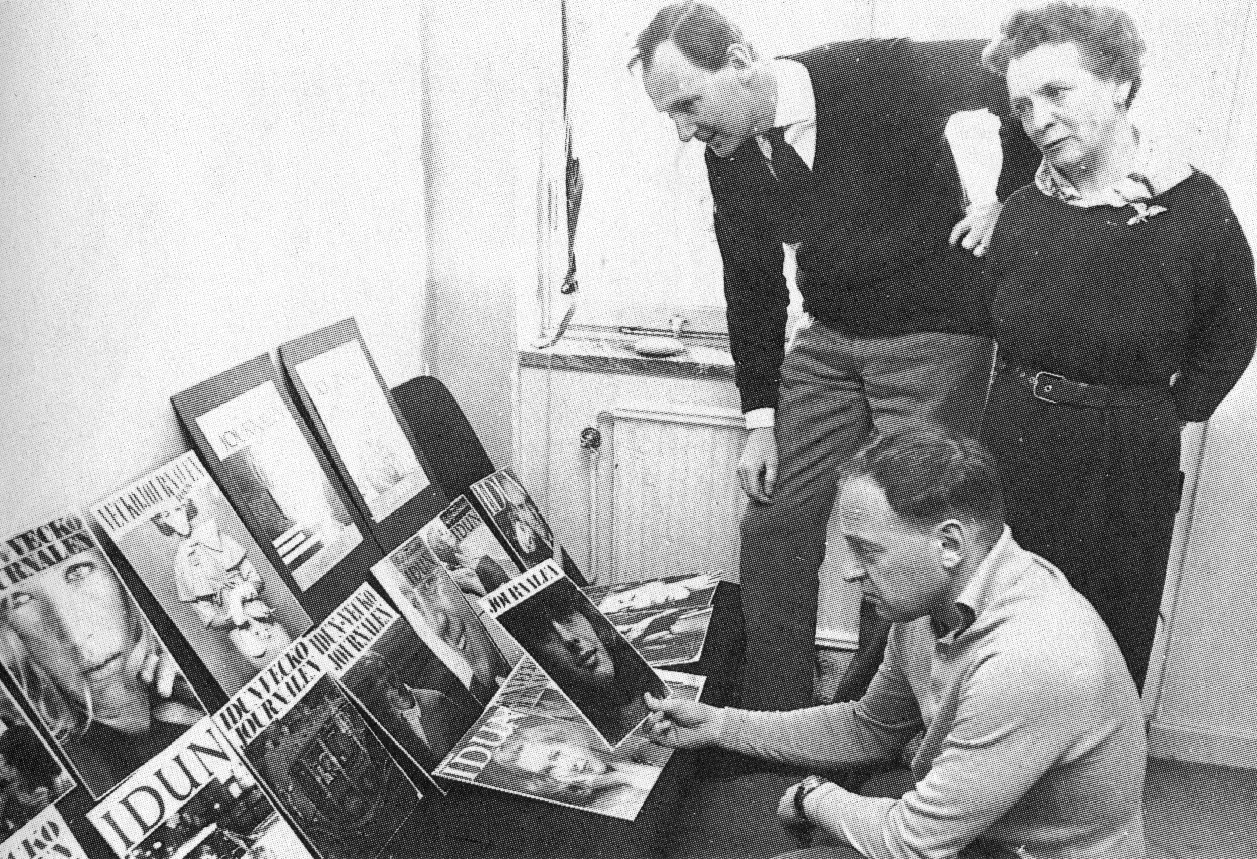 Idun och Vecko-Journalen skall slås samman till en tidskrift. Bokförläggare Lukas Bonnier studerar de olika förslagen till omslagssida med namn och stilsorter. Gustaf von Platen och Eva Hökerberg avvaktar högste chefens val.